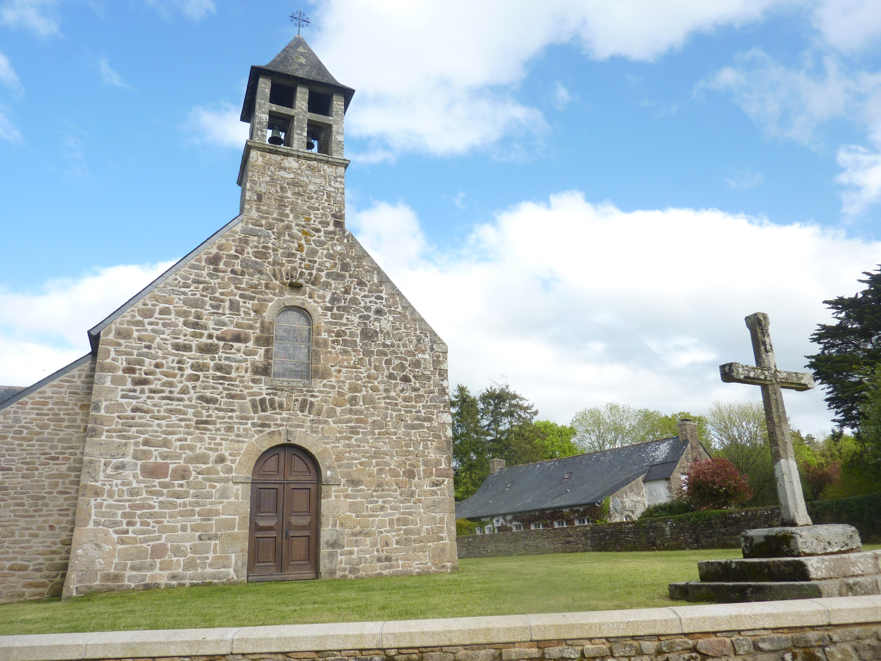 La chapelle Saint-Théa et son calvaire.